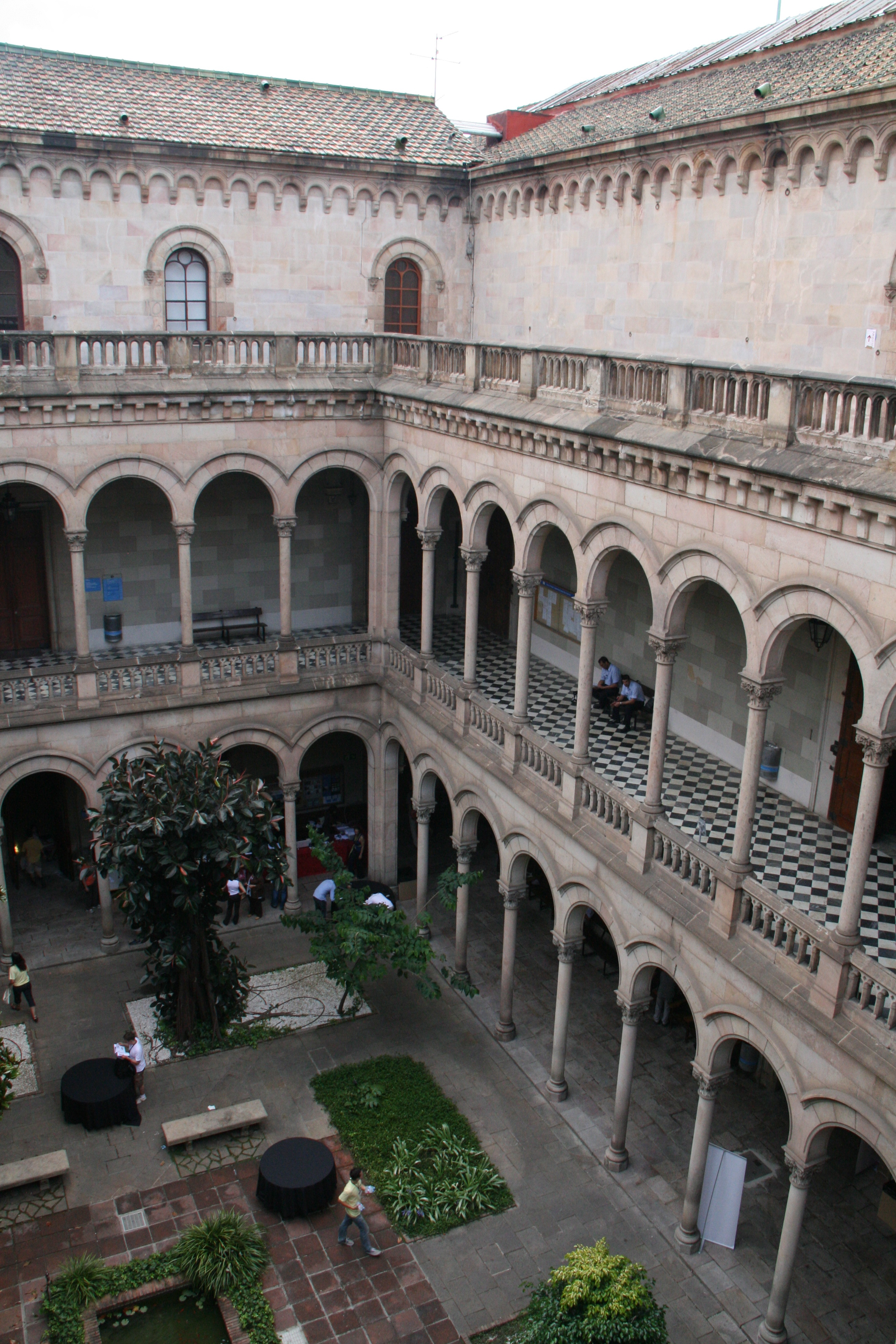 Patio Interior de la Universidad